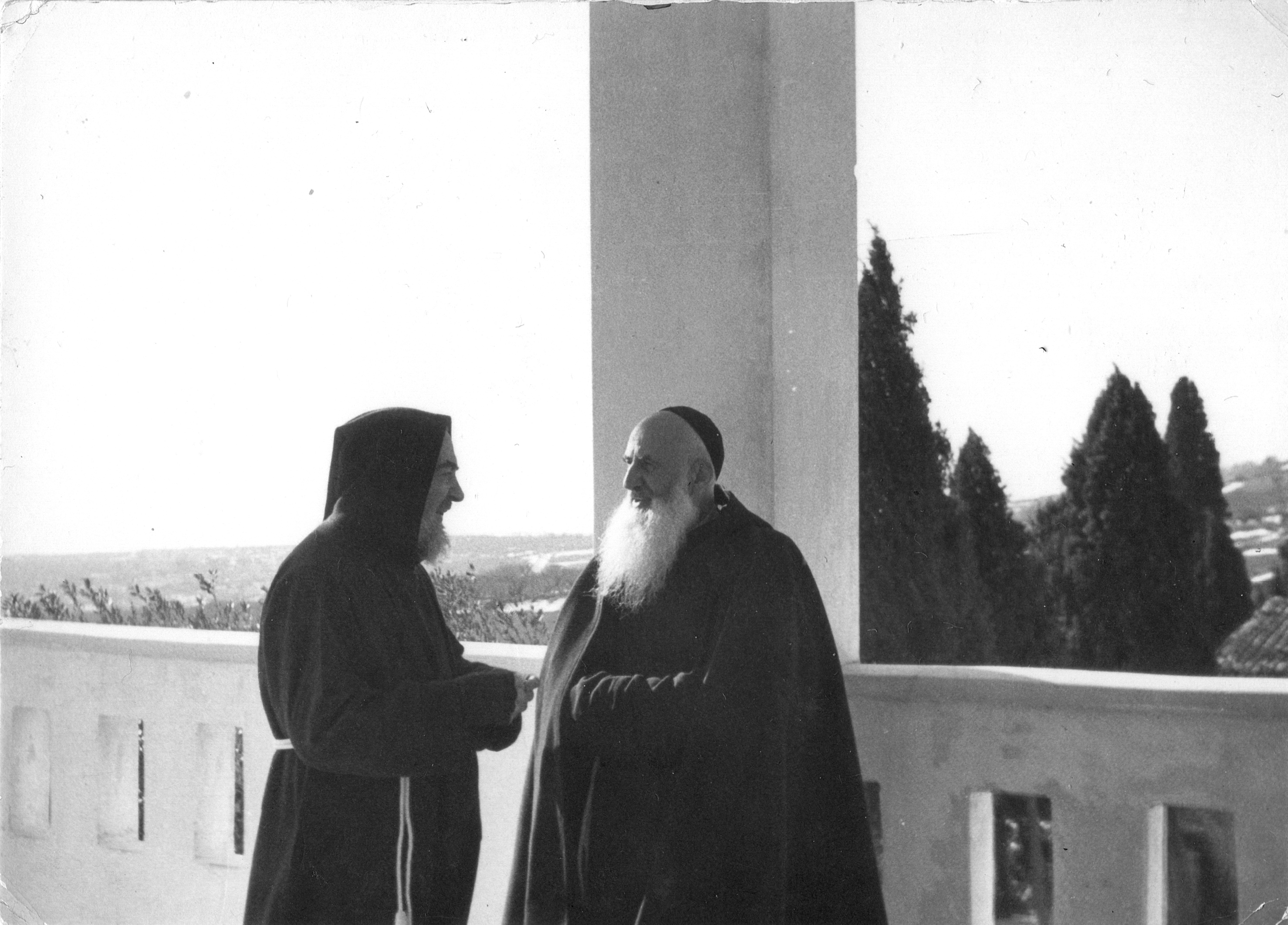 Padre Clemente Da Postiglione e San Pio presso il Convento dei Frati Minori Cappuccini di San Giovanni Rotondo (FG)